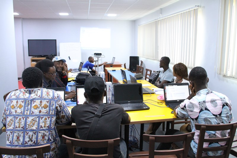 Journée de contribution francophone à l'Institut français du Cameroun - Douala